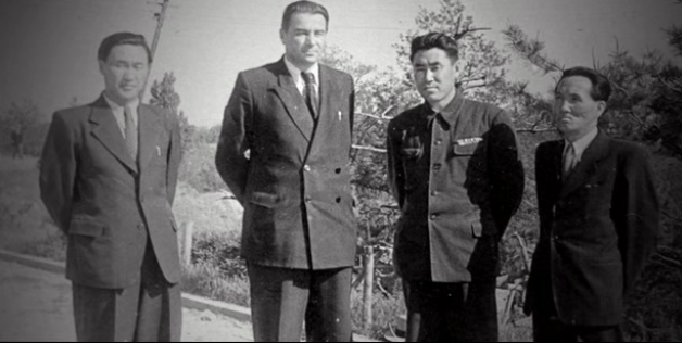 제2차 세계대전에 유일한 조선인 출신 북한 문화선전성 제1부상 시절 정상진(1955년)